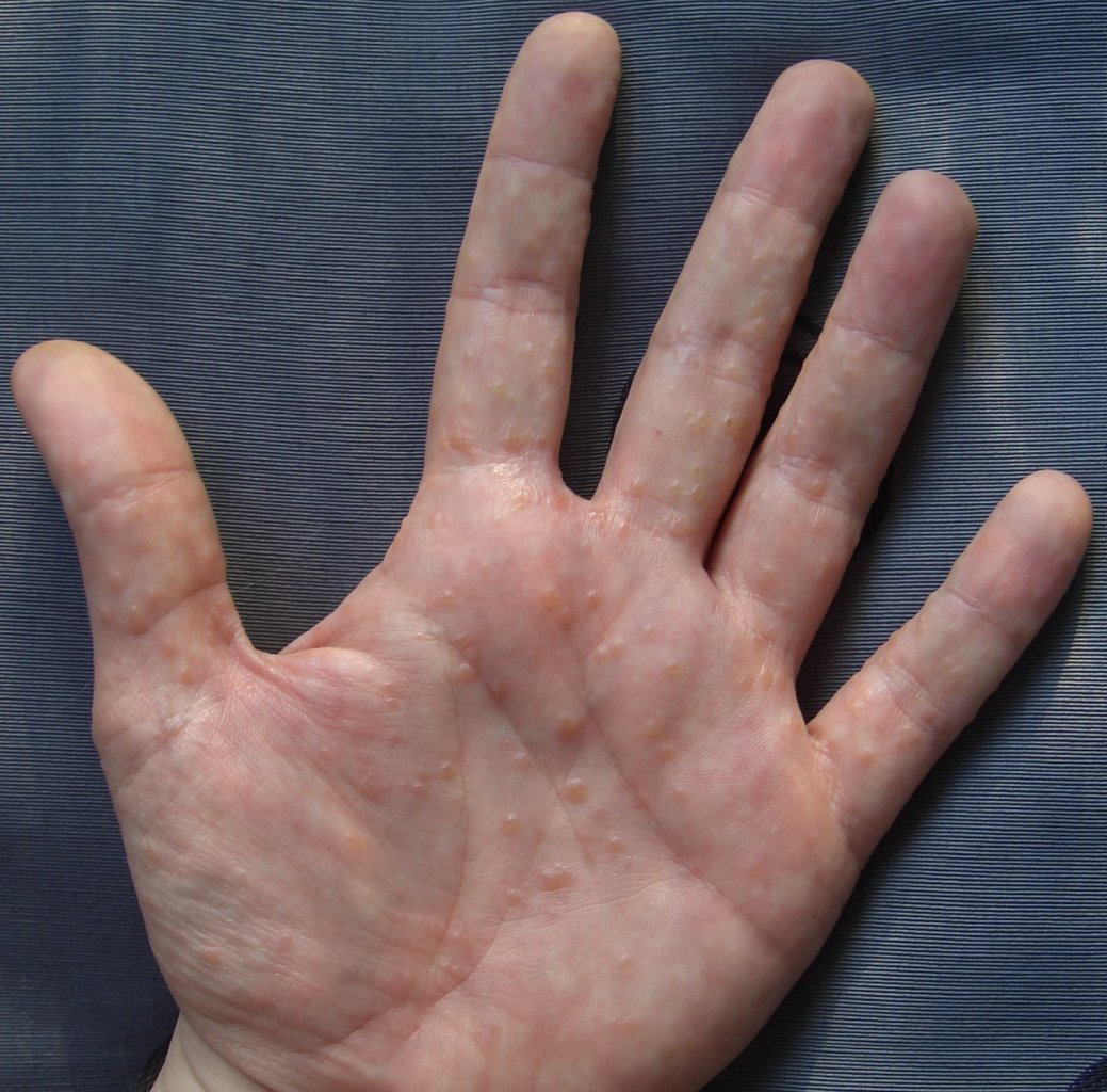 Selbsterstelltes Bild meiner Hand mit dyshidrotischem Ausschlag. meine hände und füsse sehen genauso wie das bild Self-created image of my hand with dyshidrotisis rash. my hands and feet look just like the picture